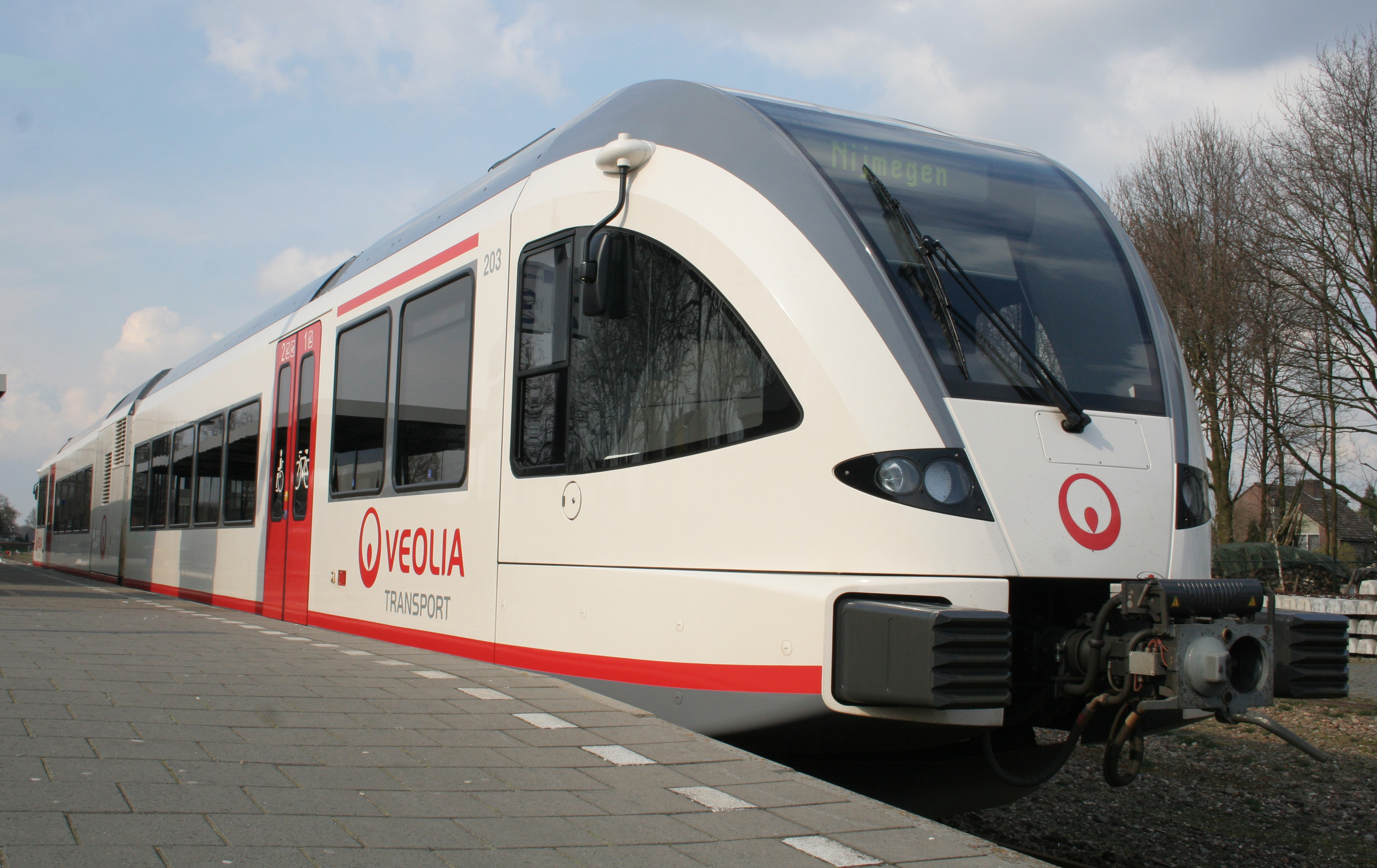 Velios trein in station Venray, Oostrum